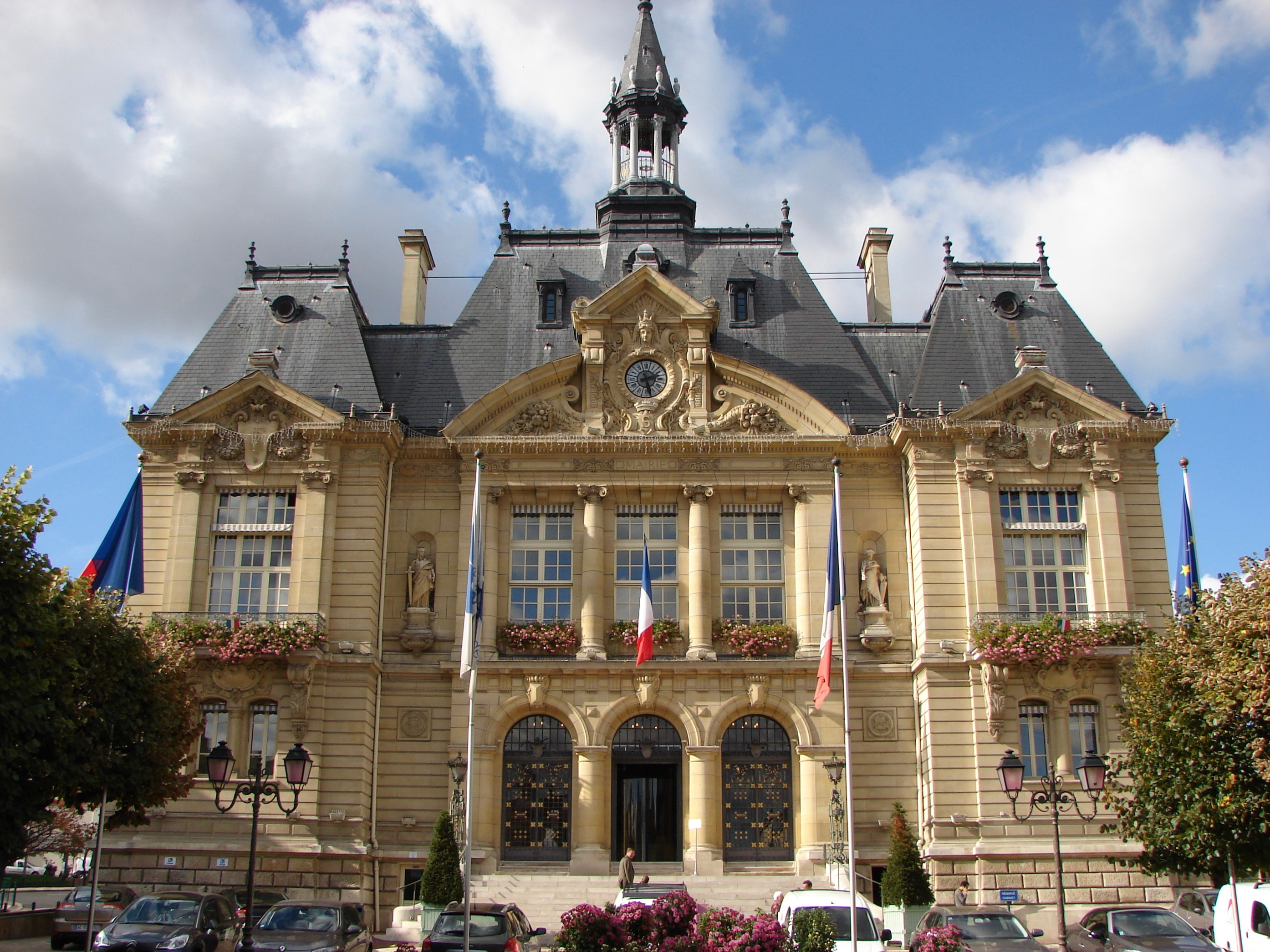 Marie de Suresnes de faceUnknownUnknown town hall of suresnes (front)